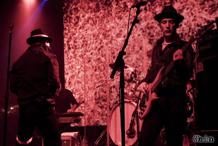 Doctor Deseo en una actuación en Madrid.